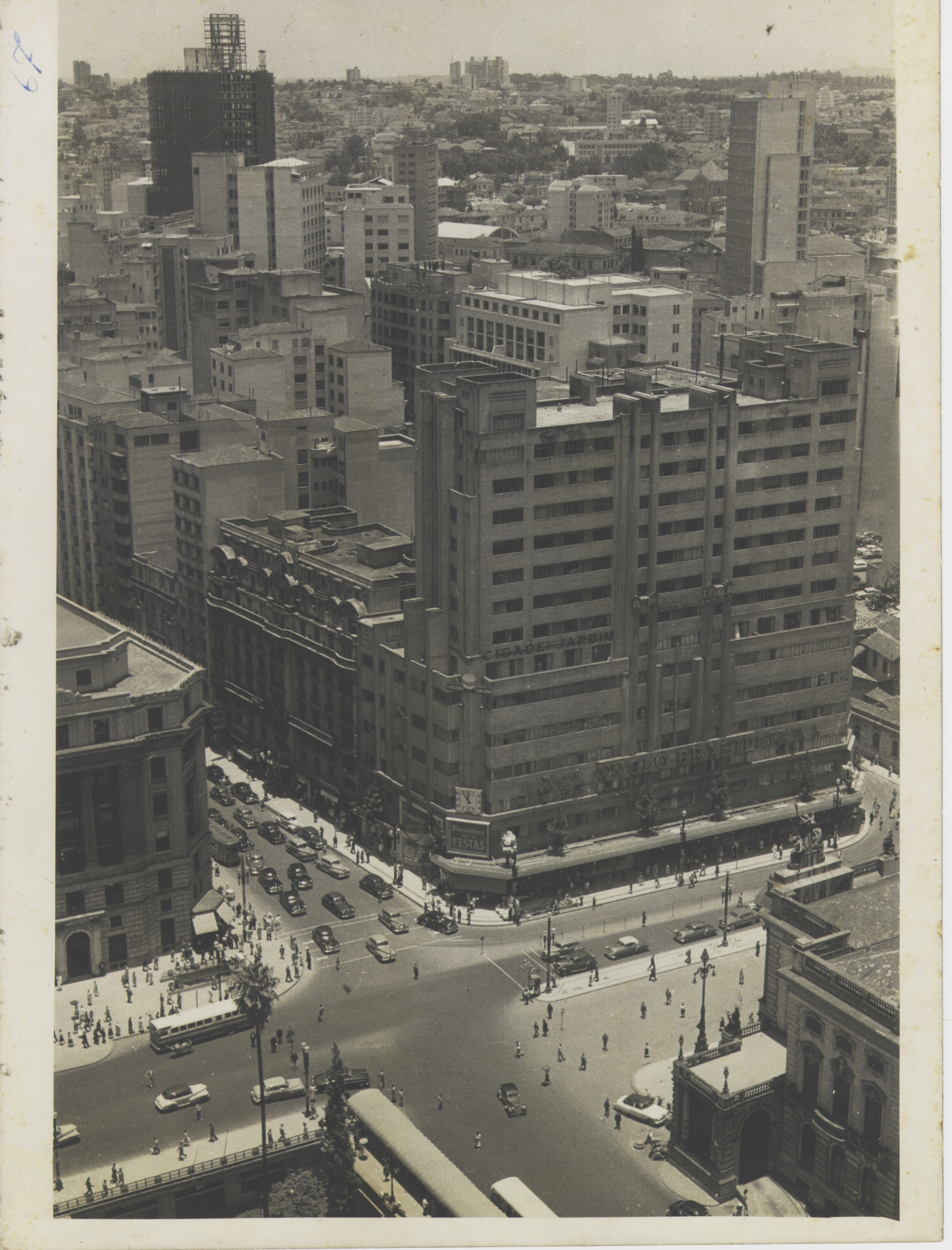 Obra que integra o acervo do Museu Paulista da USP. Coleção Werner Haberkorn